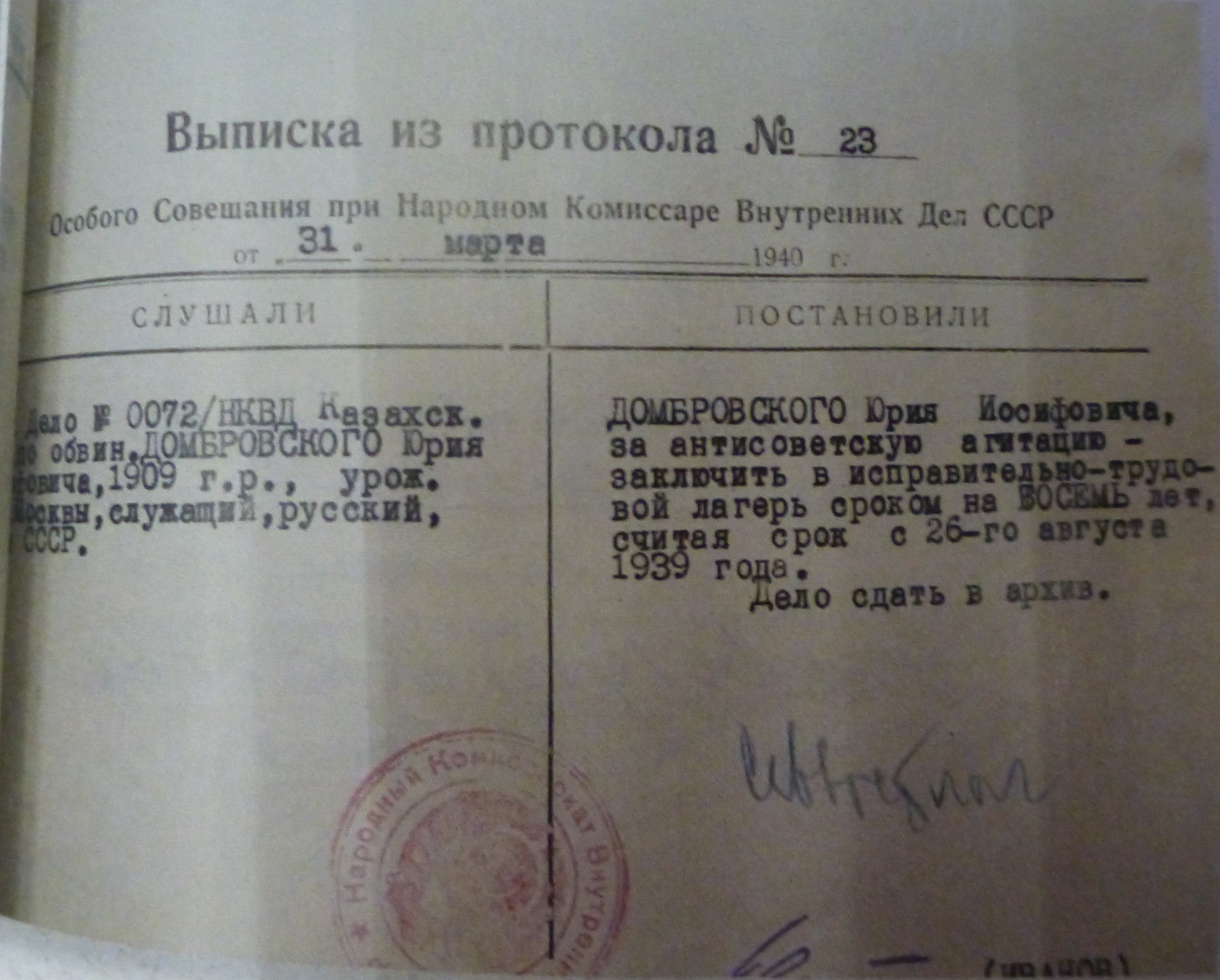 Выписка из протокола Особого совещания при наркоме внутренних дел СССР от 31 марта 1940 года о приговоре Юрию Домбровскому